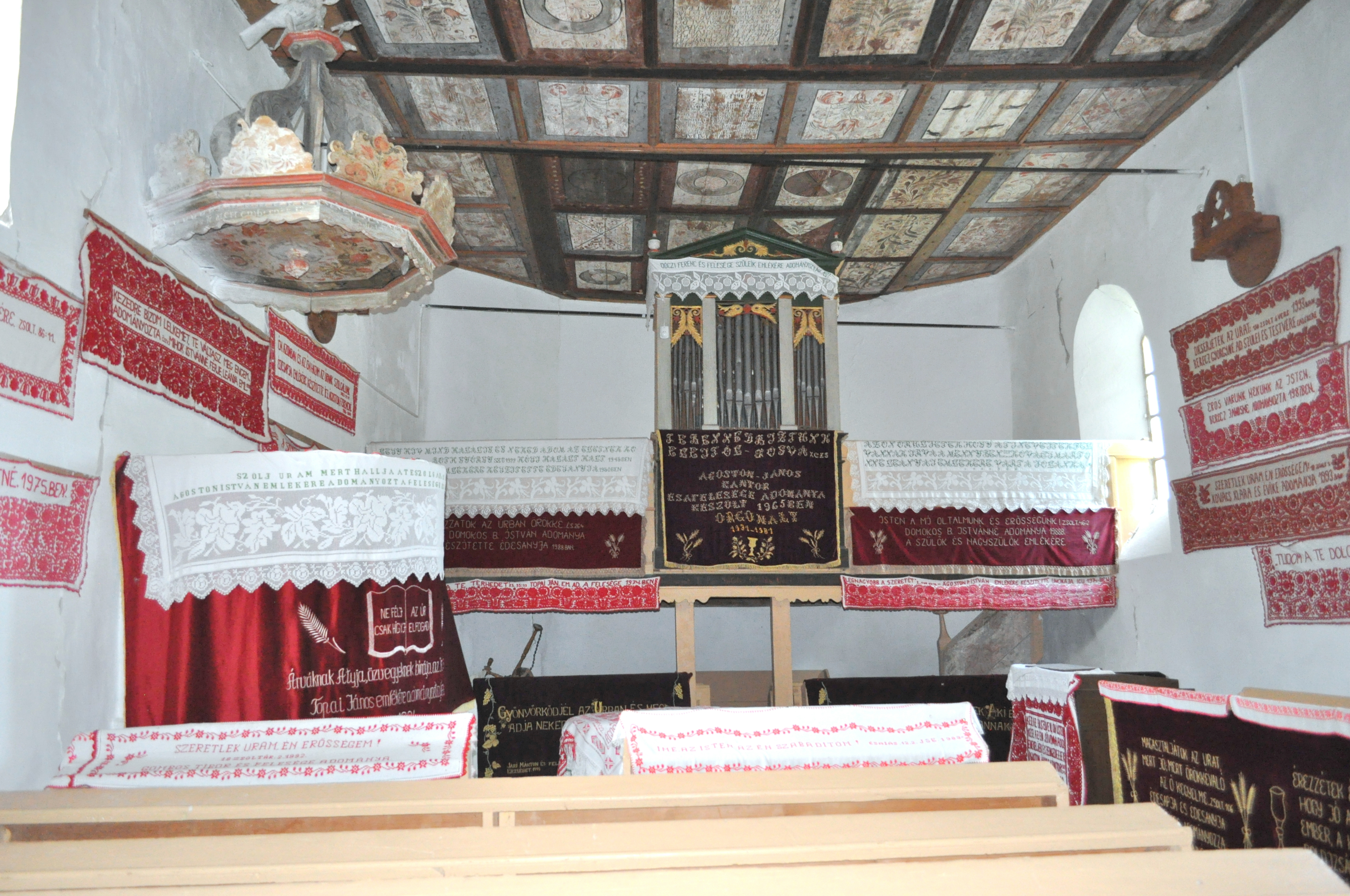 Biserica reformată, sat Petrindu; comuna Cuzăplac 01